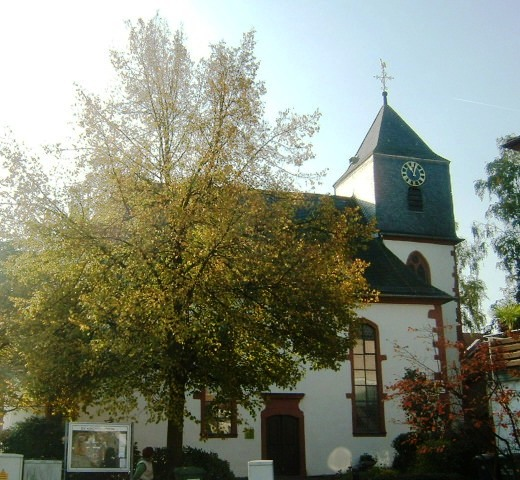 evangelische Kirche in Niedereschbach